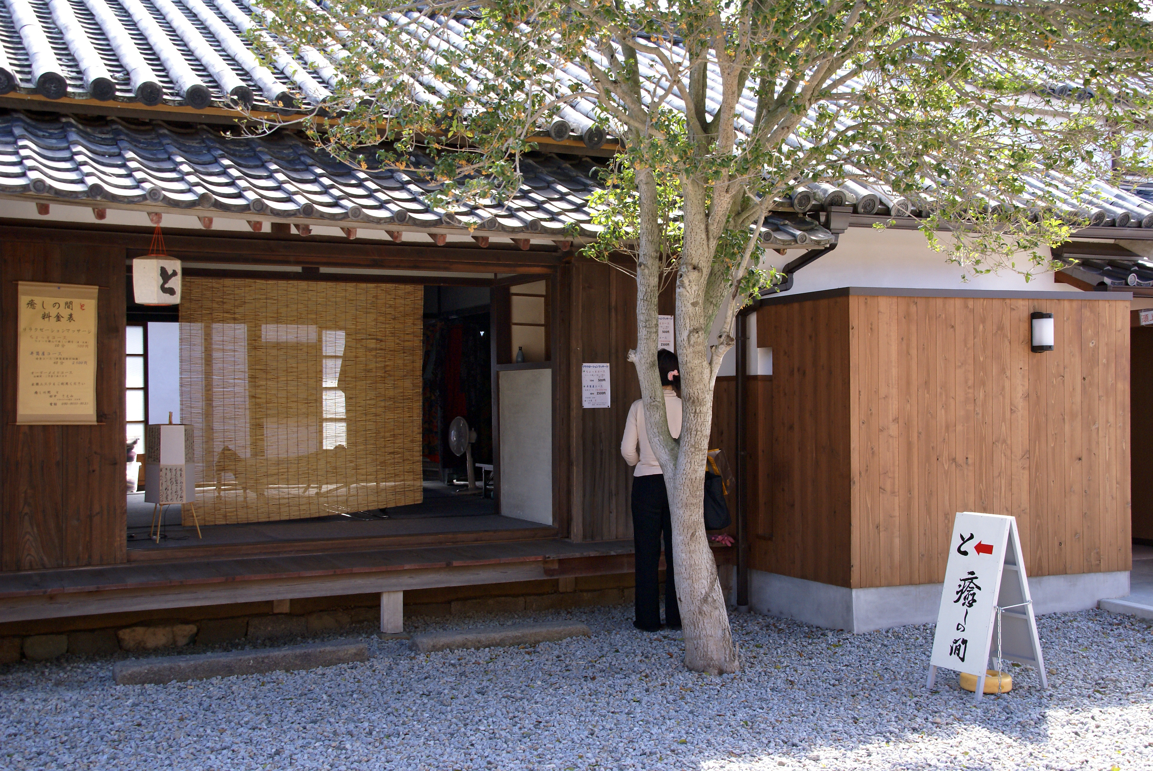 Sanshu Idutsu-yashiki in Hiketa, Higashikagawa, Kagawa prefecture, Japan